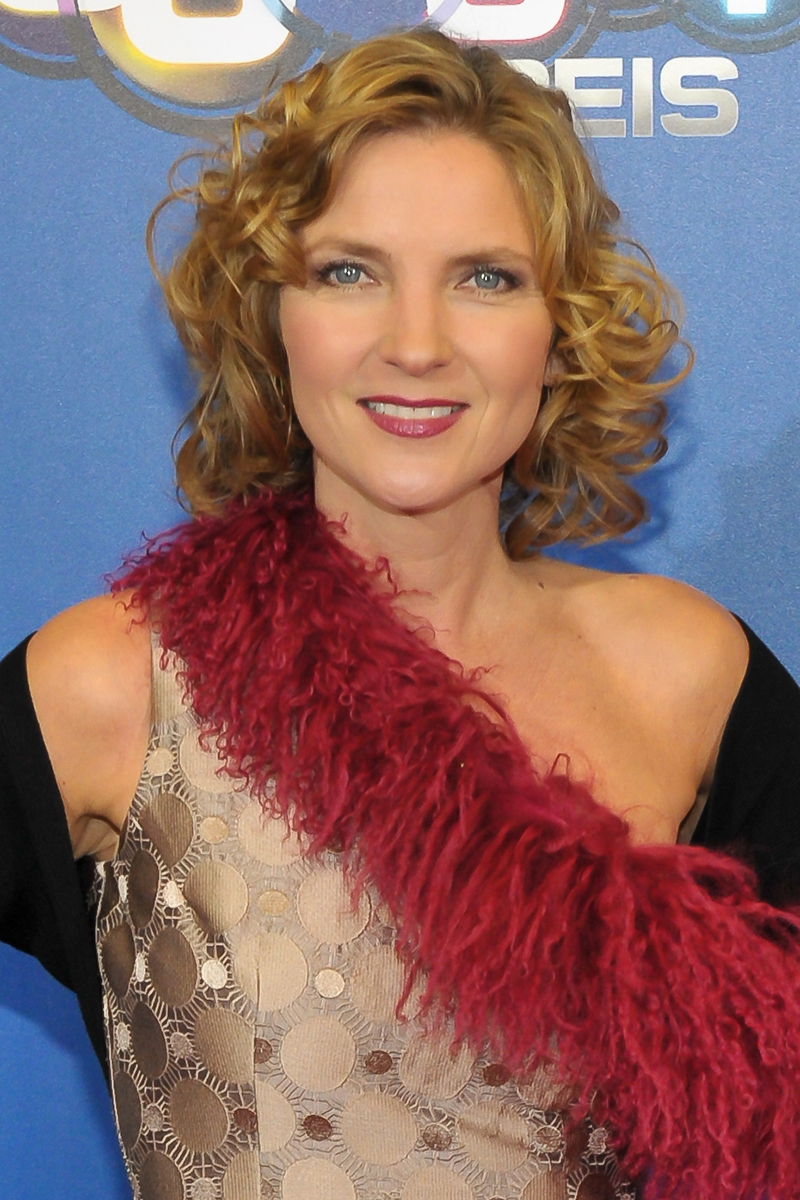 Susanne Pätzold auf dem Deutschen Comedypreis in Köln am 15. Oktober 2013.